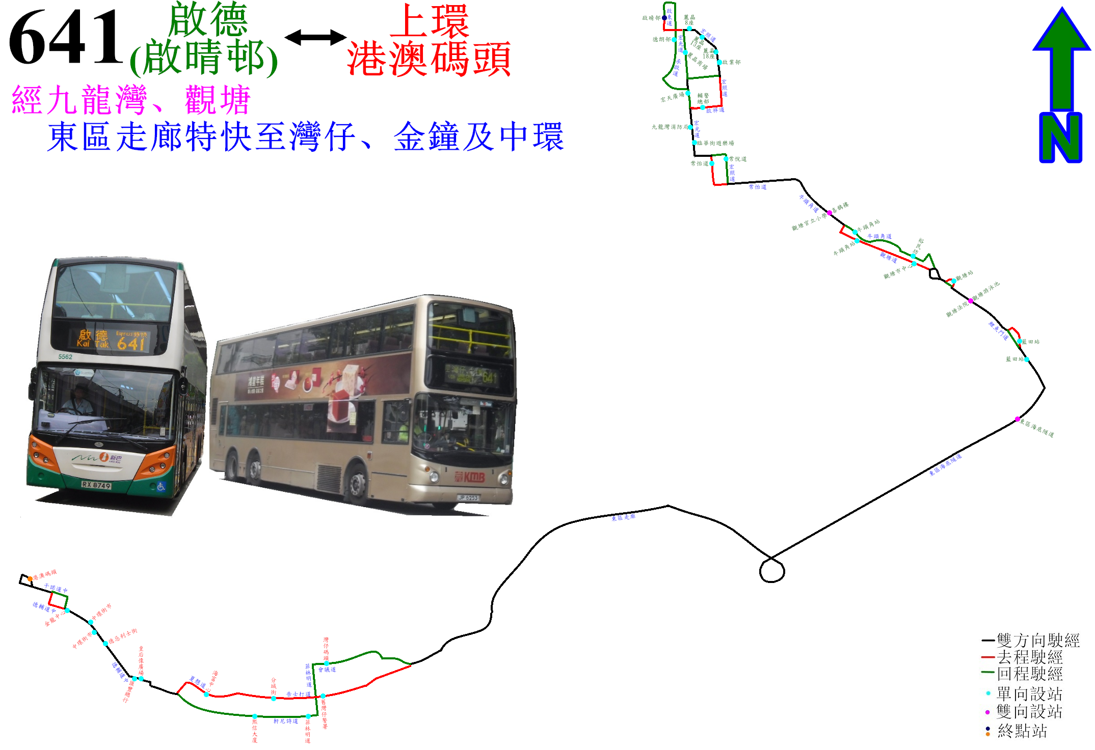 中文（香港）: 過海隧巴641線的走線圖